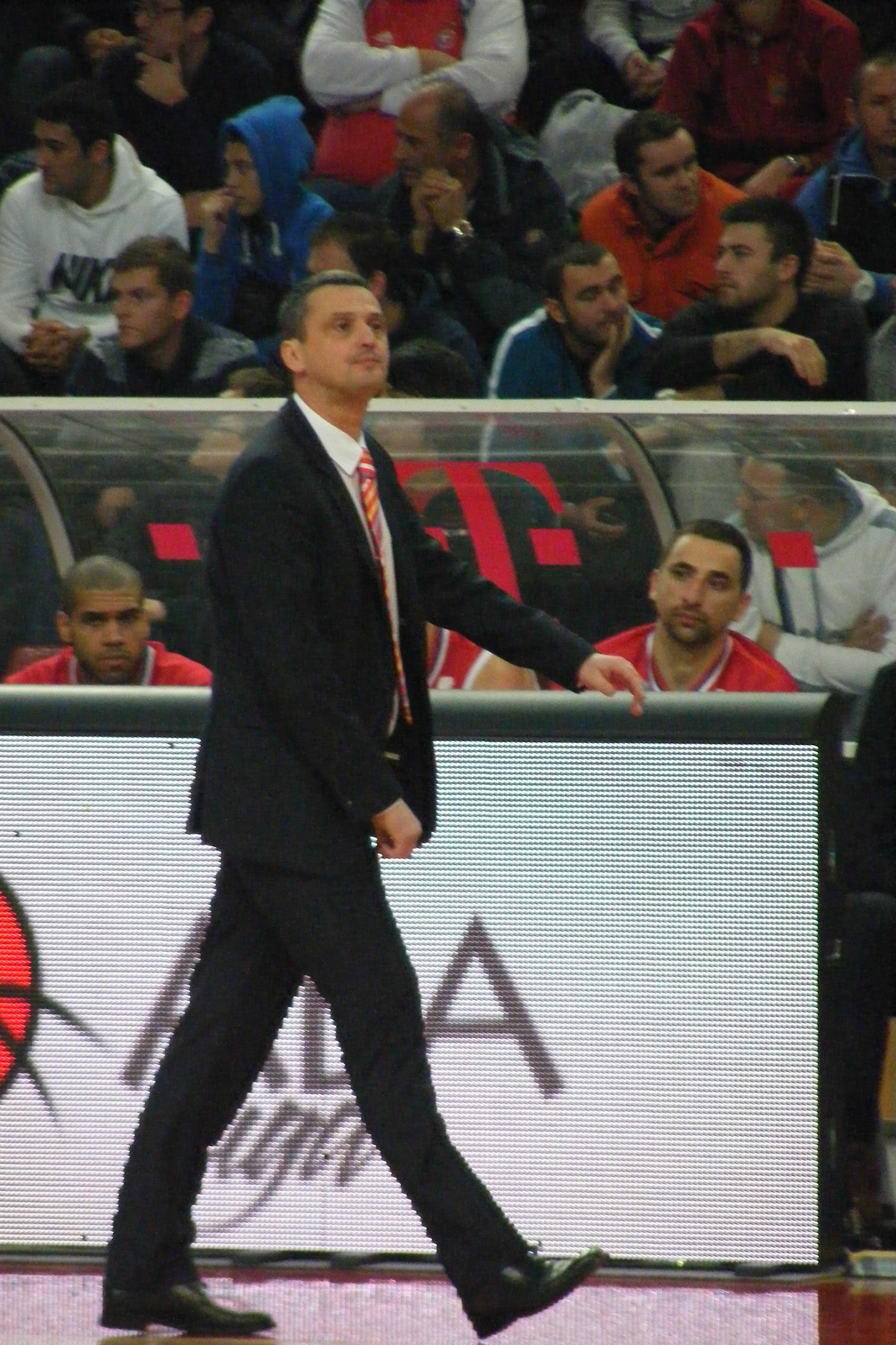 Дејан Радоњиќ